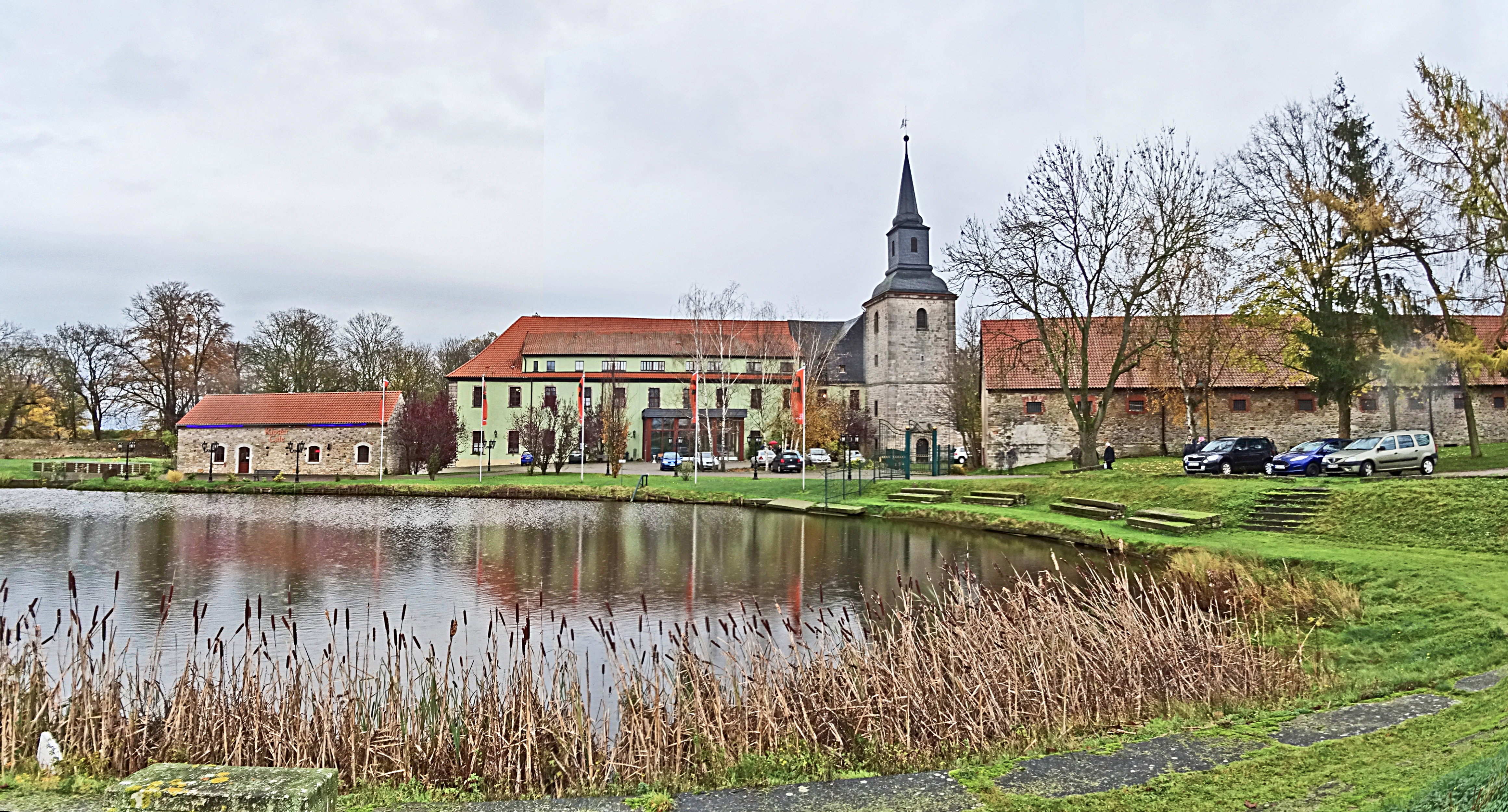 Panorama Kloster Meyendorf